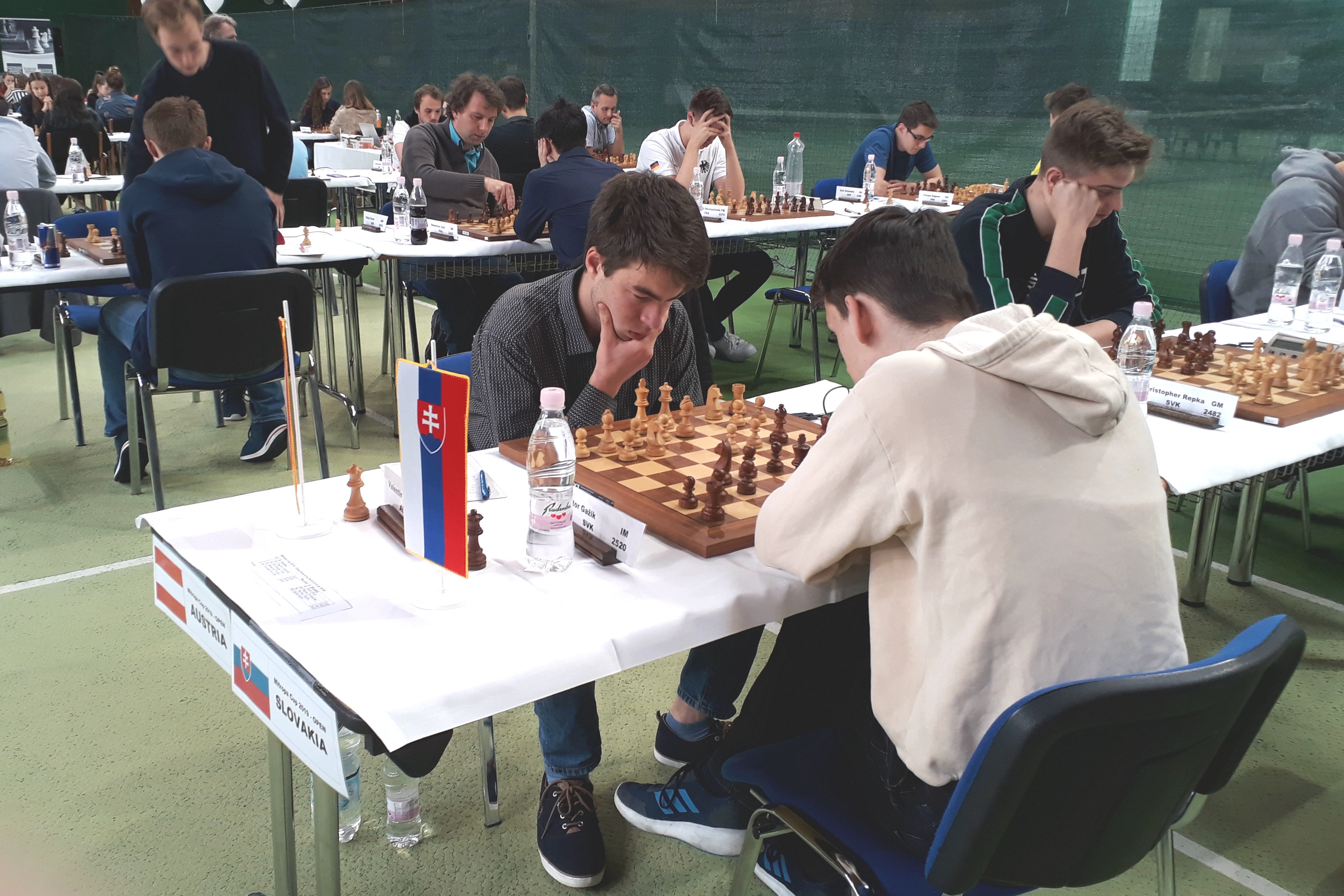 Österreich-Slowakei: Valentin Dragnev an Brett 1, Runde 4 Mitropa Cup 2019 in Radenci.